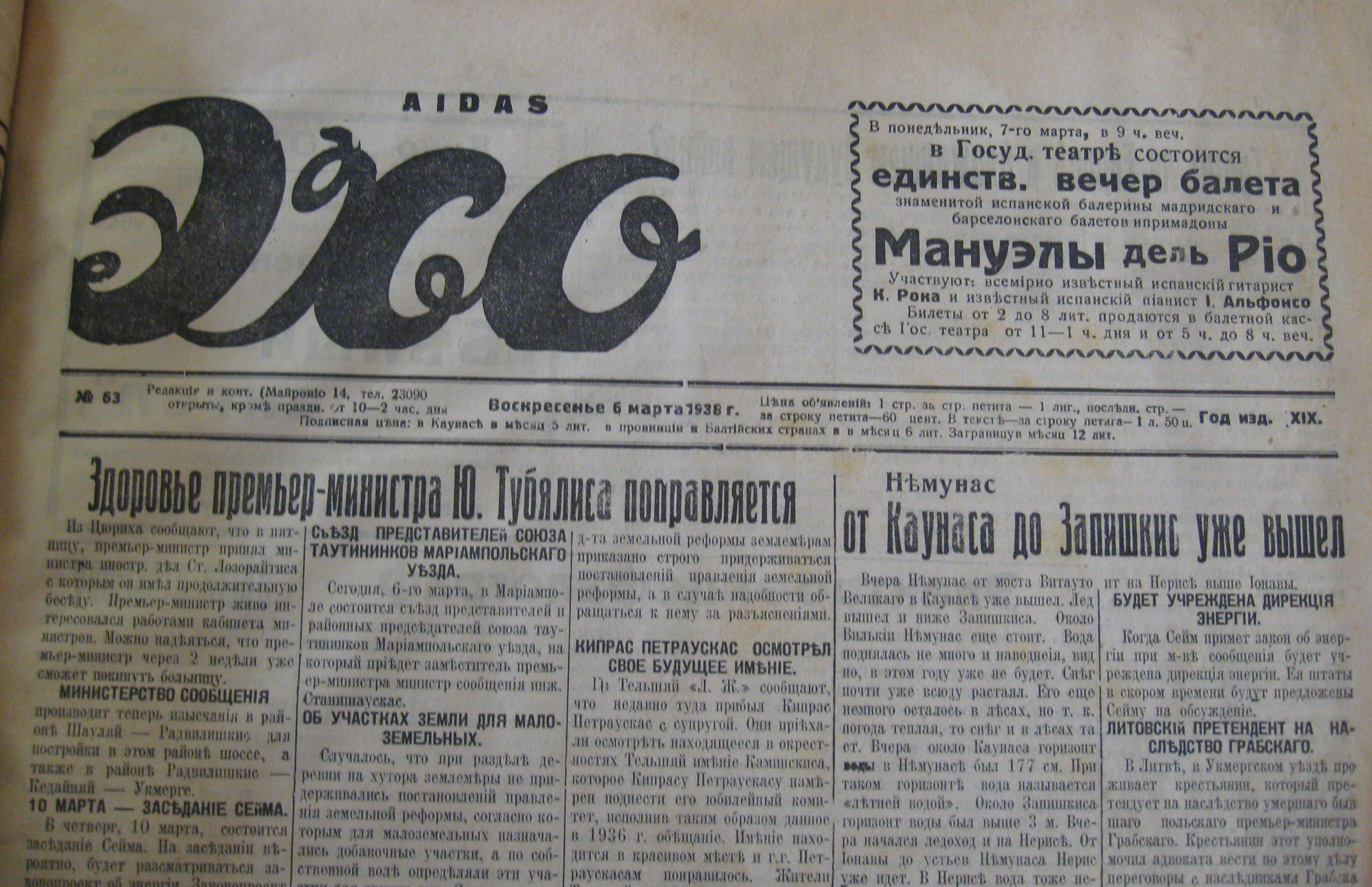 Dienraštis „Echo“ rusų kalba, Nr. 63, 1938 m.